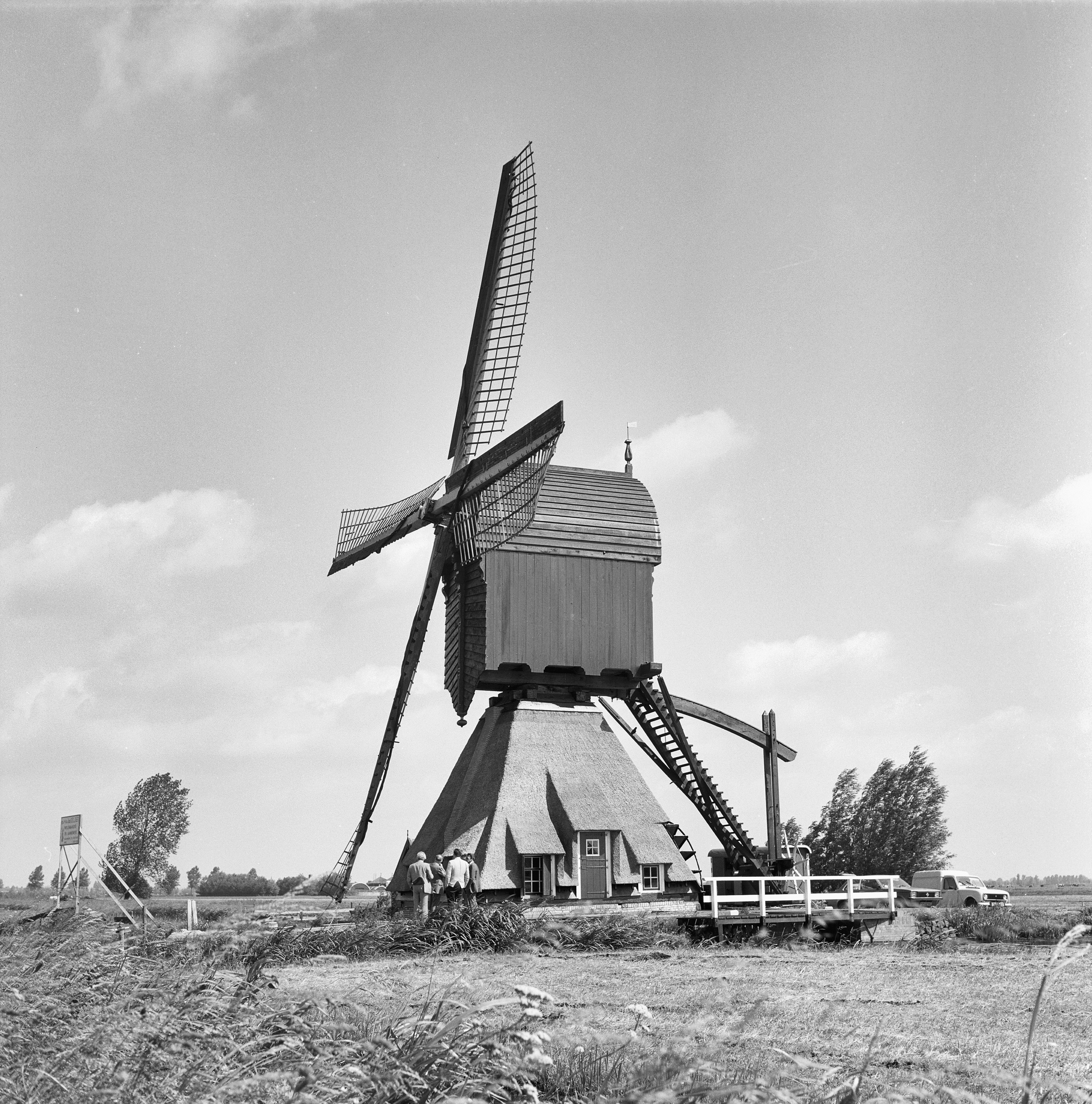 Diversen: "De Westermolen", overzicht